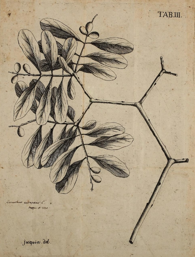 Loranthus europaeus a Nicolao Iosepho Jacquin pictus (Enumeratio stirpium plerarumque, quae sponte crescunt in agro Vindobonensi (1762) tab. III)